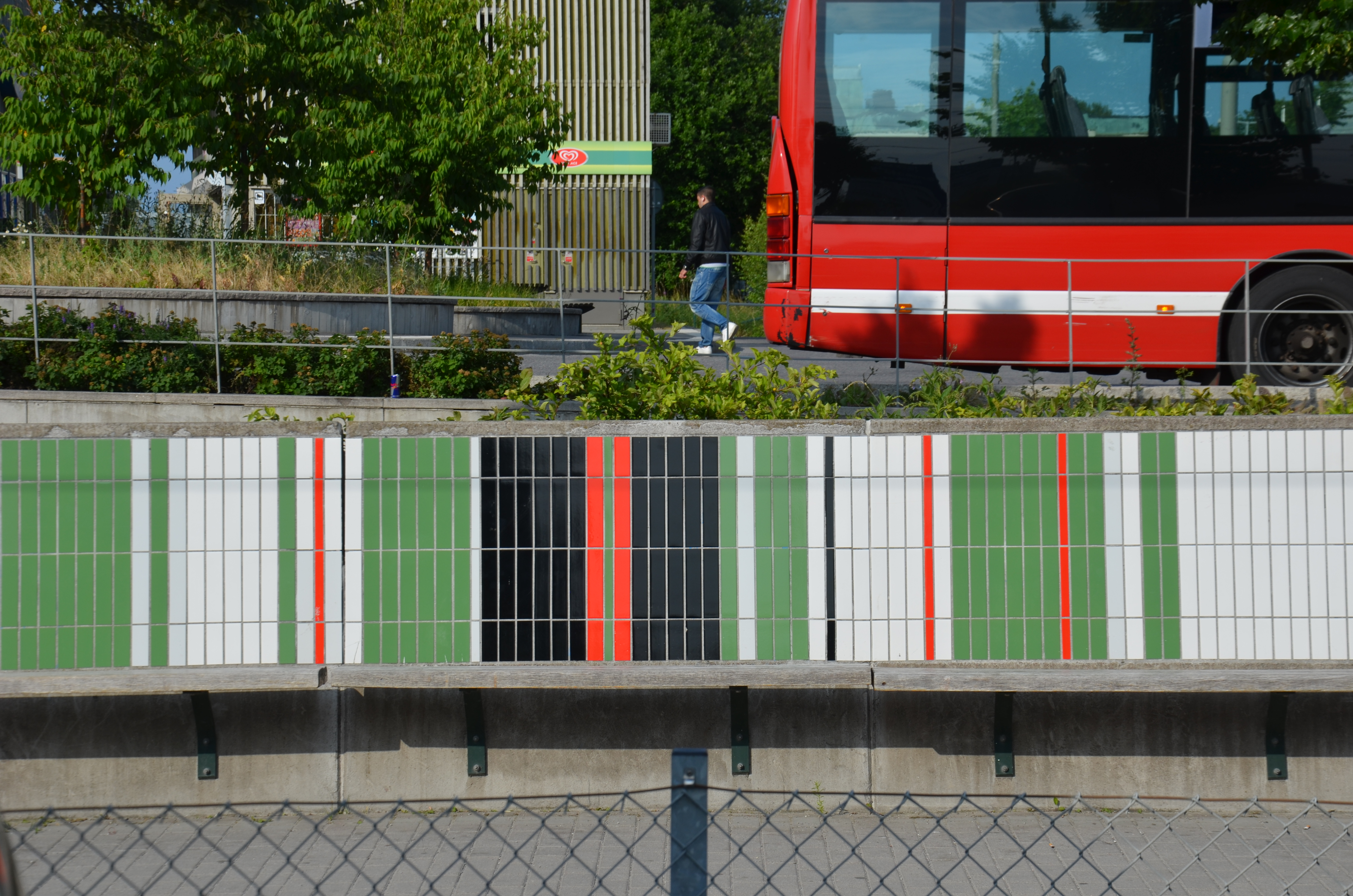 Nils Kölares utsmyckning av tvärbanestation Årstaberg i Stockholm